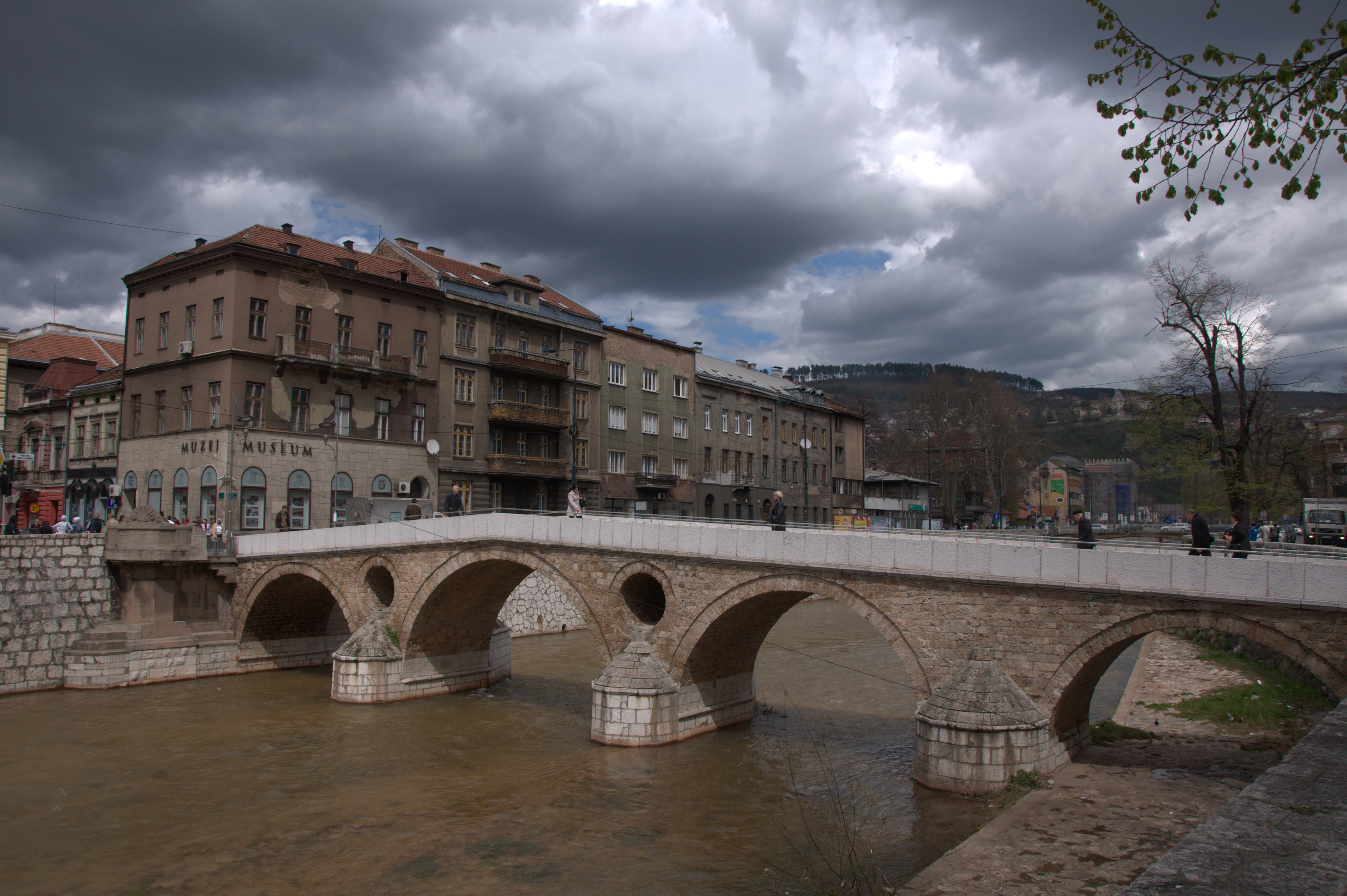 Sarajevo, Bosnia and Herzegovina